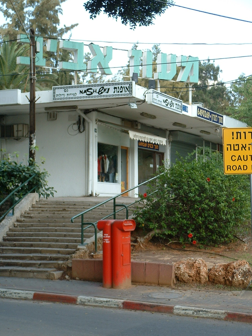 מרכז מיסחרי במעוז אביב